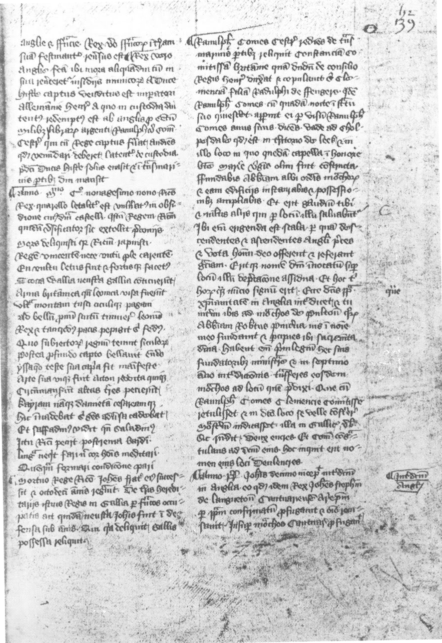 Fac-similé de la Chronique de l'abbaye de Dieulacres (Staffordshire), chronique médiévale d'une grande importance historiographique.